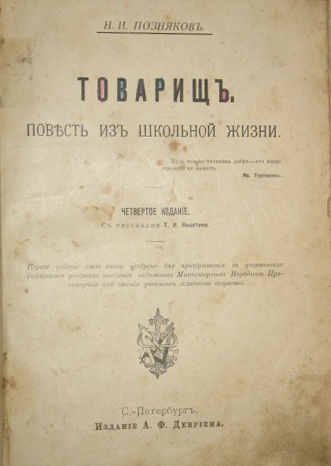 "Товарищ", книга Н. И. Познякова